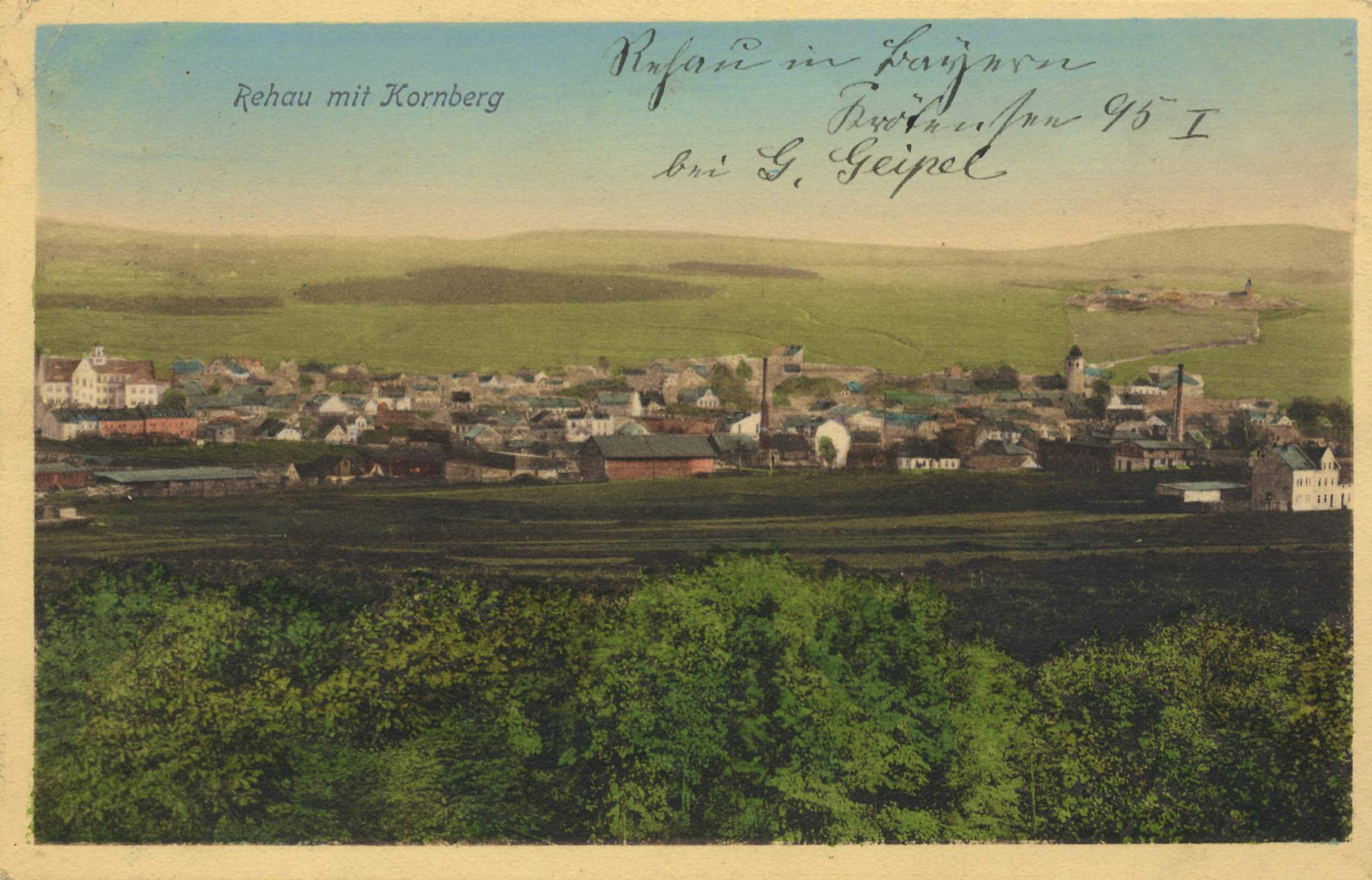 Rehau mit Kornberg